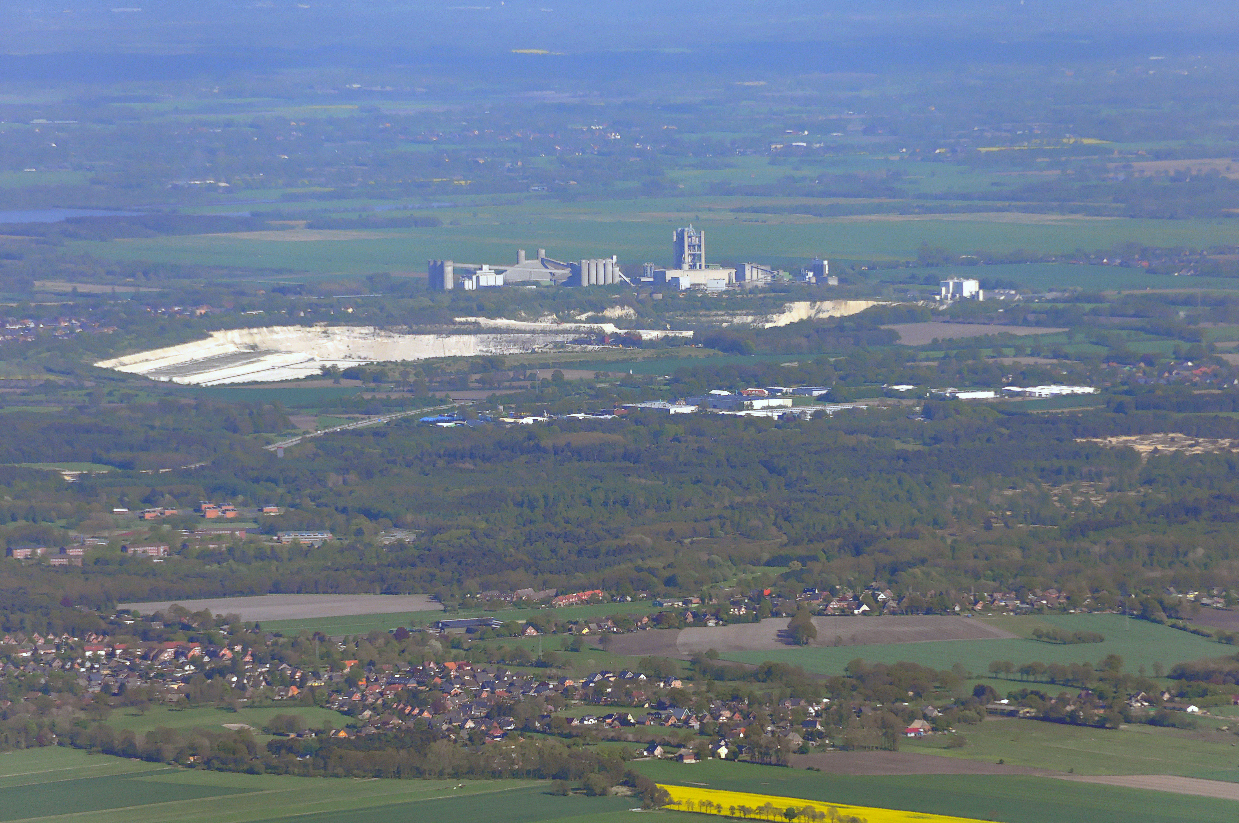 Luftbilder von der Nordseeküste 2012-05